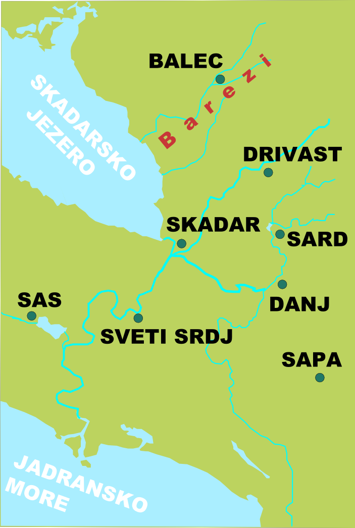 Барези, са Скадром и околином у средњем вијеку.